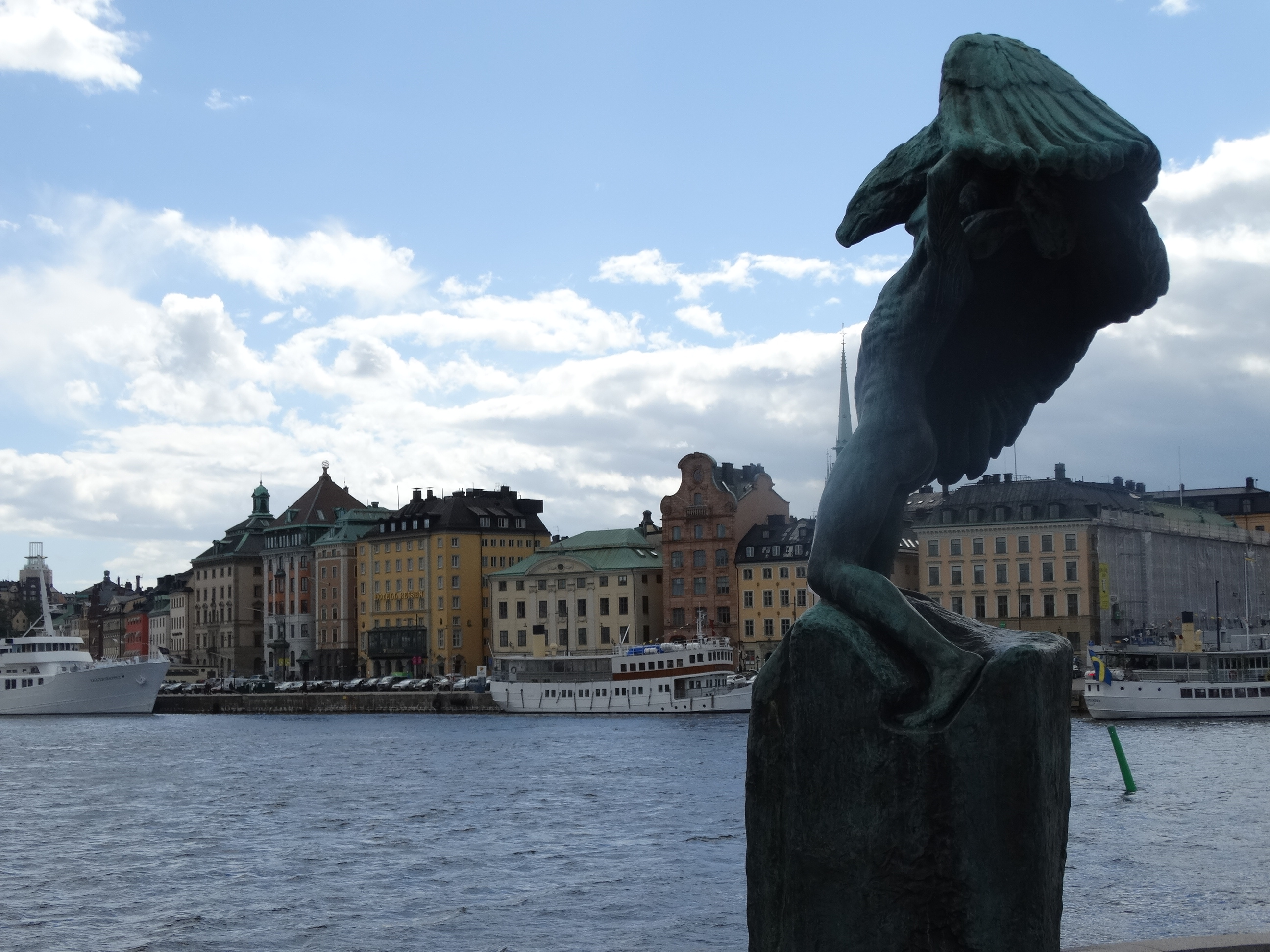 Stockholm , vue sur le port 4